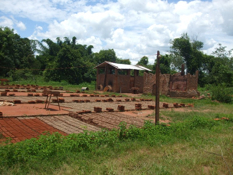 Olaria em Conceição das Alagoas